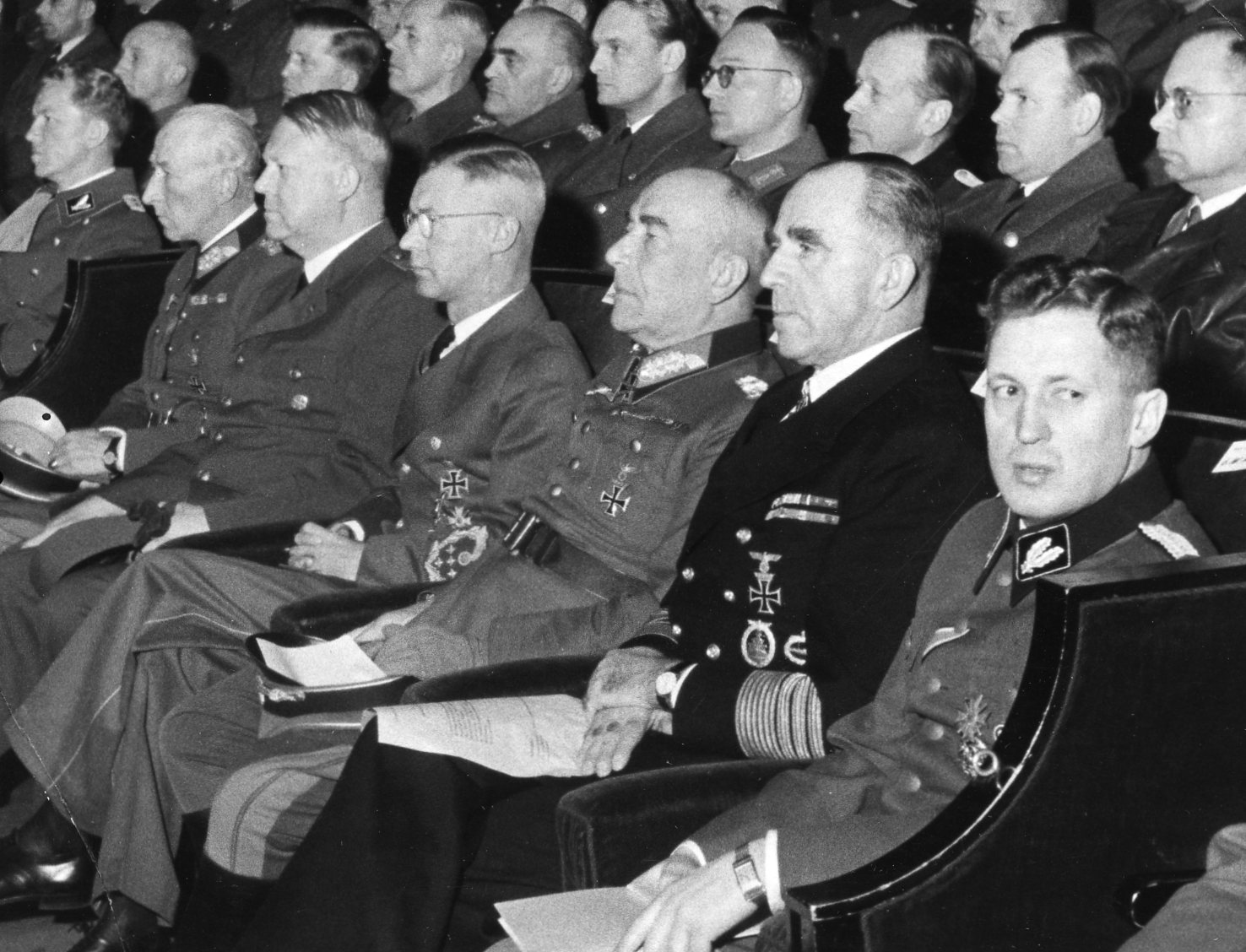 T.h. ministerialdirigent G.W. Müller. Bak Vidkun Quisling og Josef Terboven, justisminister Sverre Riisnæs, Finn Støren, arbeids- og idrettsminister Axel Stang, ukjent, fylkesordfører Olav Fermann, kansellisjef Ørnulf Lundesgaard. Ifølge bilde i Aftenposten mandag 13. november 1944 holdt Terboven kvelden før tale under minnemøte for de falne på Colosseum kino i Oslo. På bildet er også Wehrmachtsbefehlhaber in Norwegen, Generaloberst von Falkenhorst. RA/PA- 1209/Ue 90/ img012